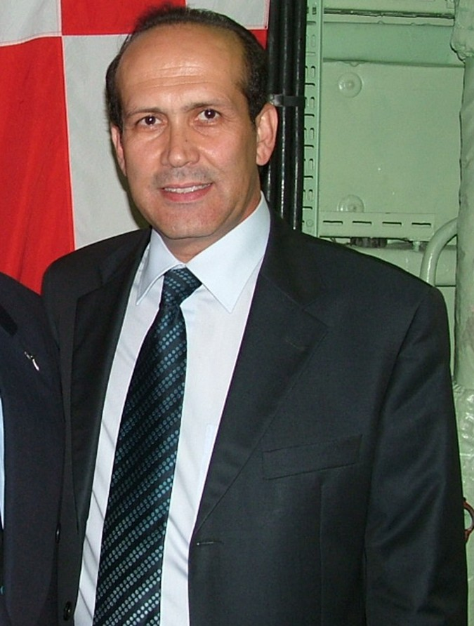 יצחק שתיל עם נמיק תאן מי שהיה שגריר טורקיה בישראל ( כיום שגריר טורקיה בארה"ב ) - עם יצחק שתיל